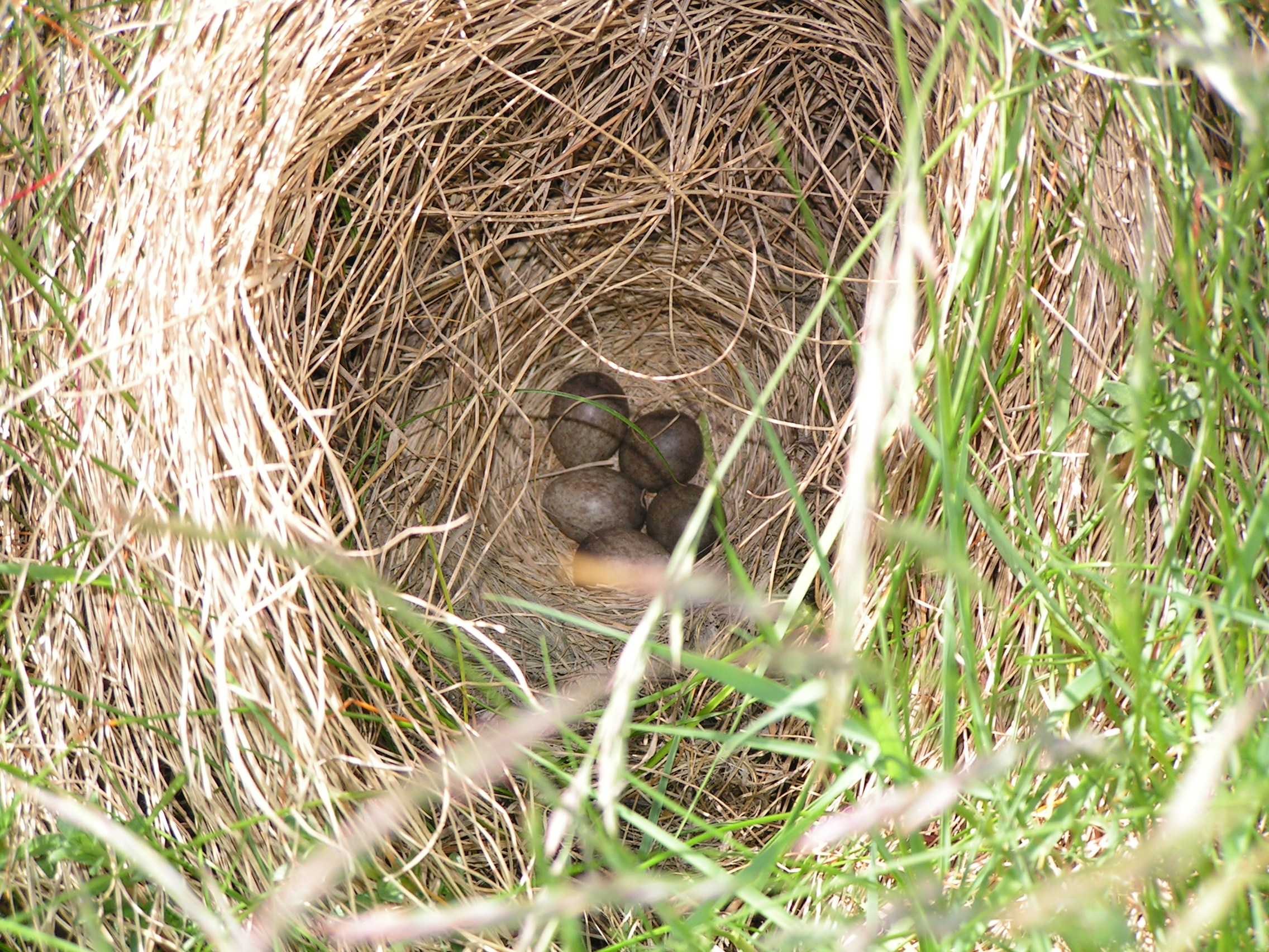 Nest of Alauda arvensis in german nationalpark Schleswig-Holsteinisches Wattenmeer.